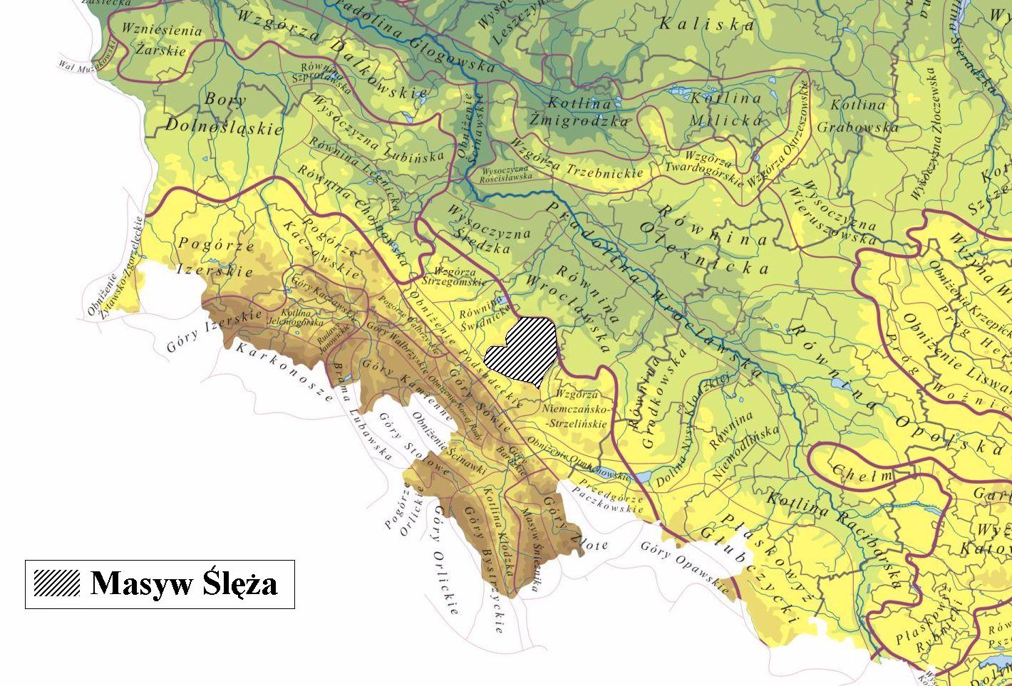 Masyw Sleza